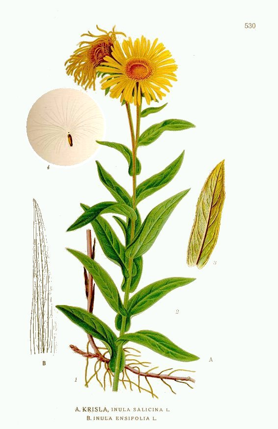 Inula salicina L., Inula ensifolia L. Original Description A. Krisla, Inula salicina L. B. Inula ensifolia L.